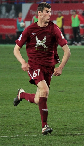 Соломон Кверквелия игрок ФК Рубин